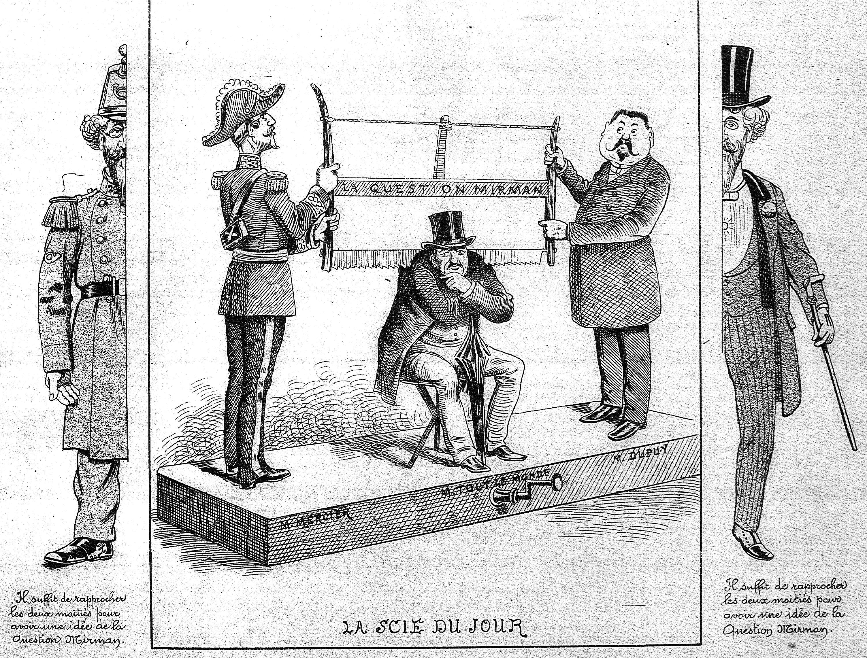 issu de "portrait de rémois" de la bibliothèque de Reims.